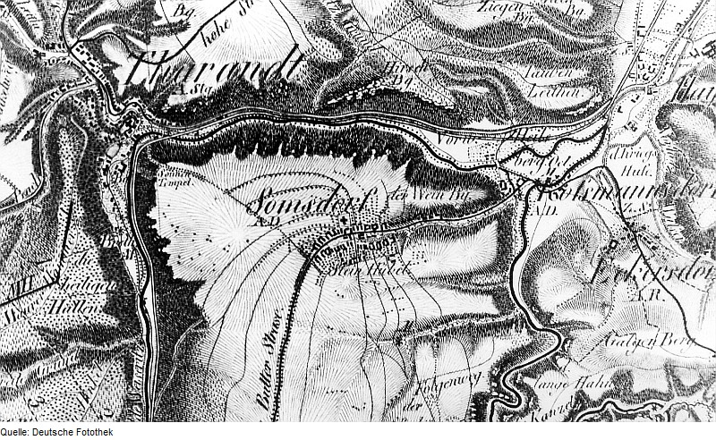 Original image description from the Deutsche Fotothek Freital-Somsdorf. Oberreit, Sect. Dresden, 1821/22